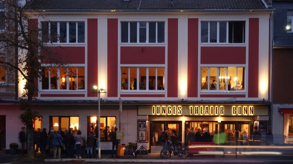 Die Außenfassade des Jungen Theaters nach seiner Renovierung 2016.